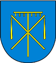 Herb Brzezówki w powiecie cieszyńskim, gminie Hażlach